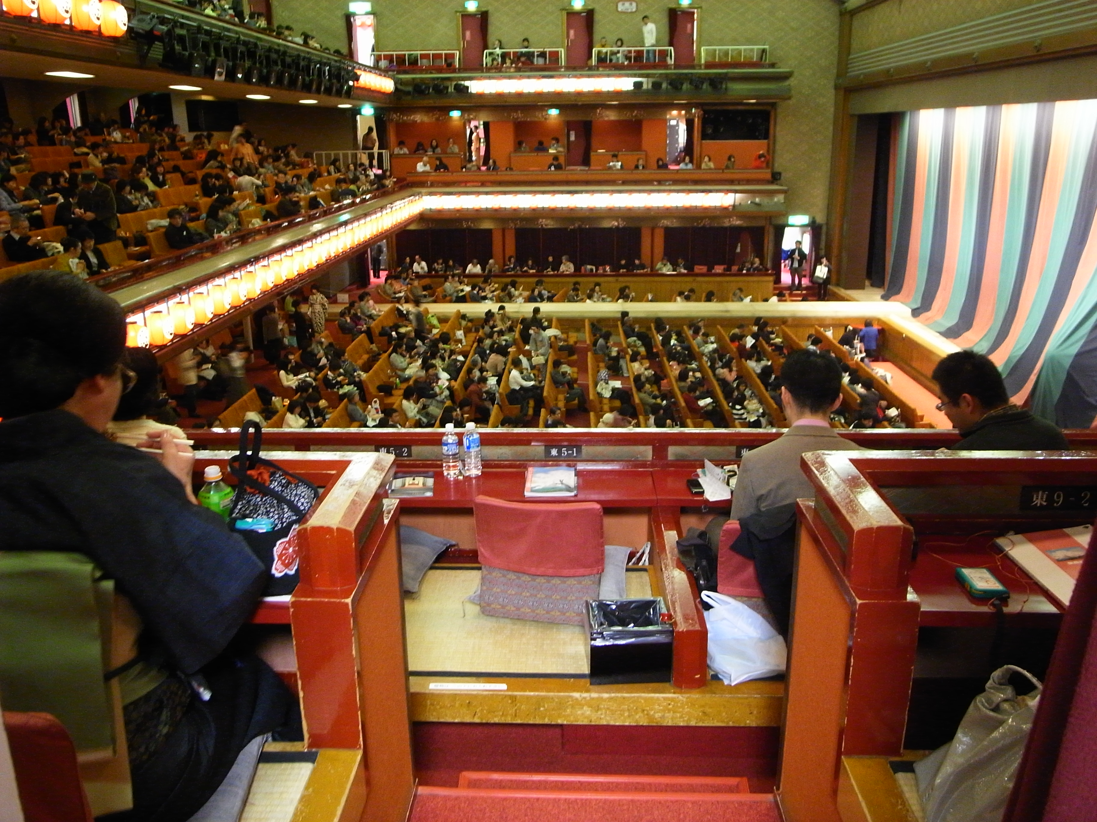 御名残三月大歌舞伎 ２階桟敷